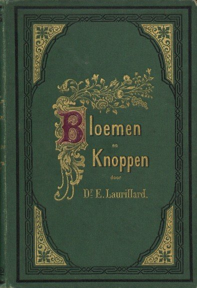 Omslag van Bloemen en knoppen. Hierin staat de eerste sonnettenkrans in het Nederlands.